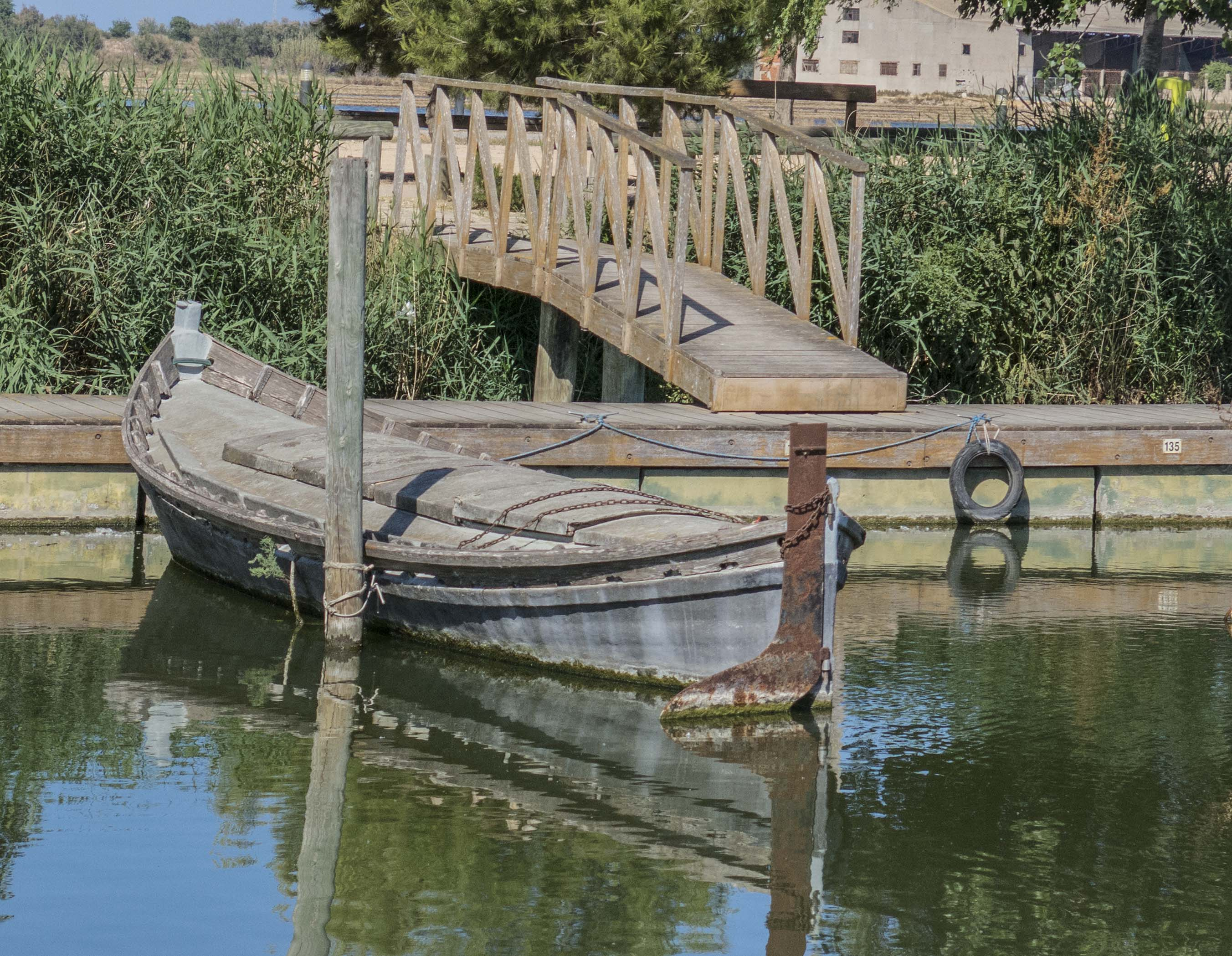 Catarroja és un municipi del País Valencià situat a la comarca de l'Horta Sud. El port és un dels punts d'entrada al Parc Natural de l'Albufera de València.